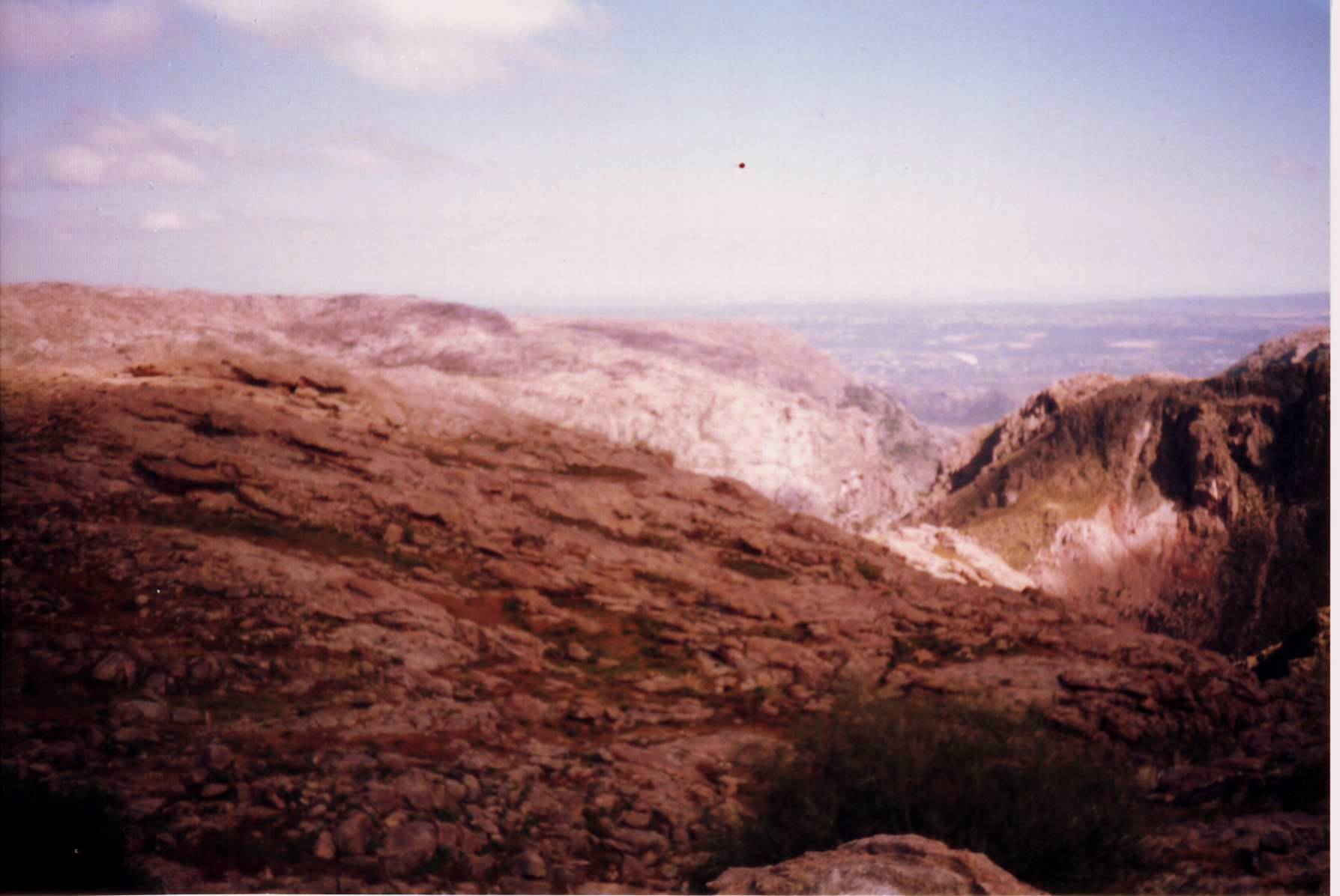 Paisaje de las Sierras Grandes, Córdoba. 1997